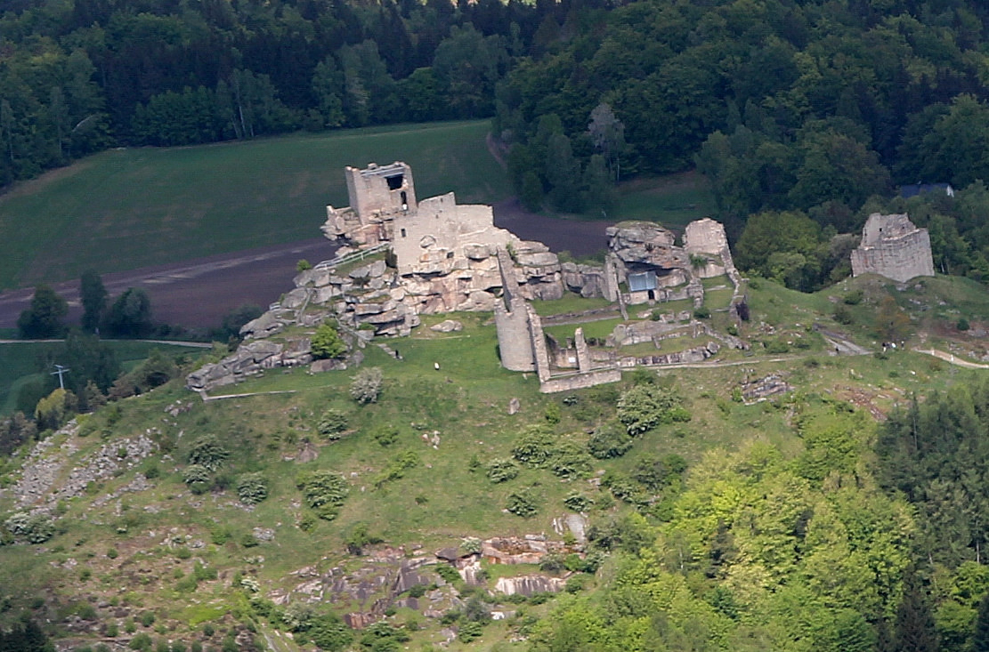 Burgruine Flossenbürg, Landkreis Neustadt an der Waldnaab, Oberpfalz, Bayern (2014)